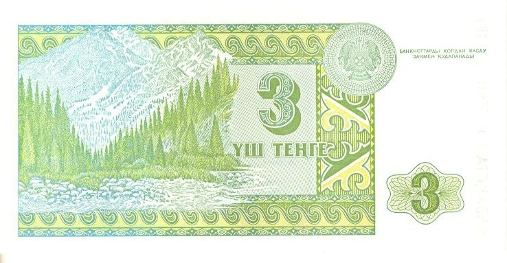 3 тенге 1993 года